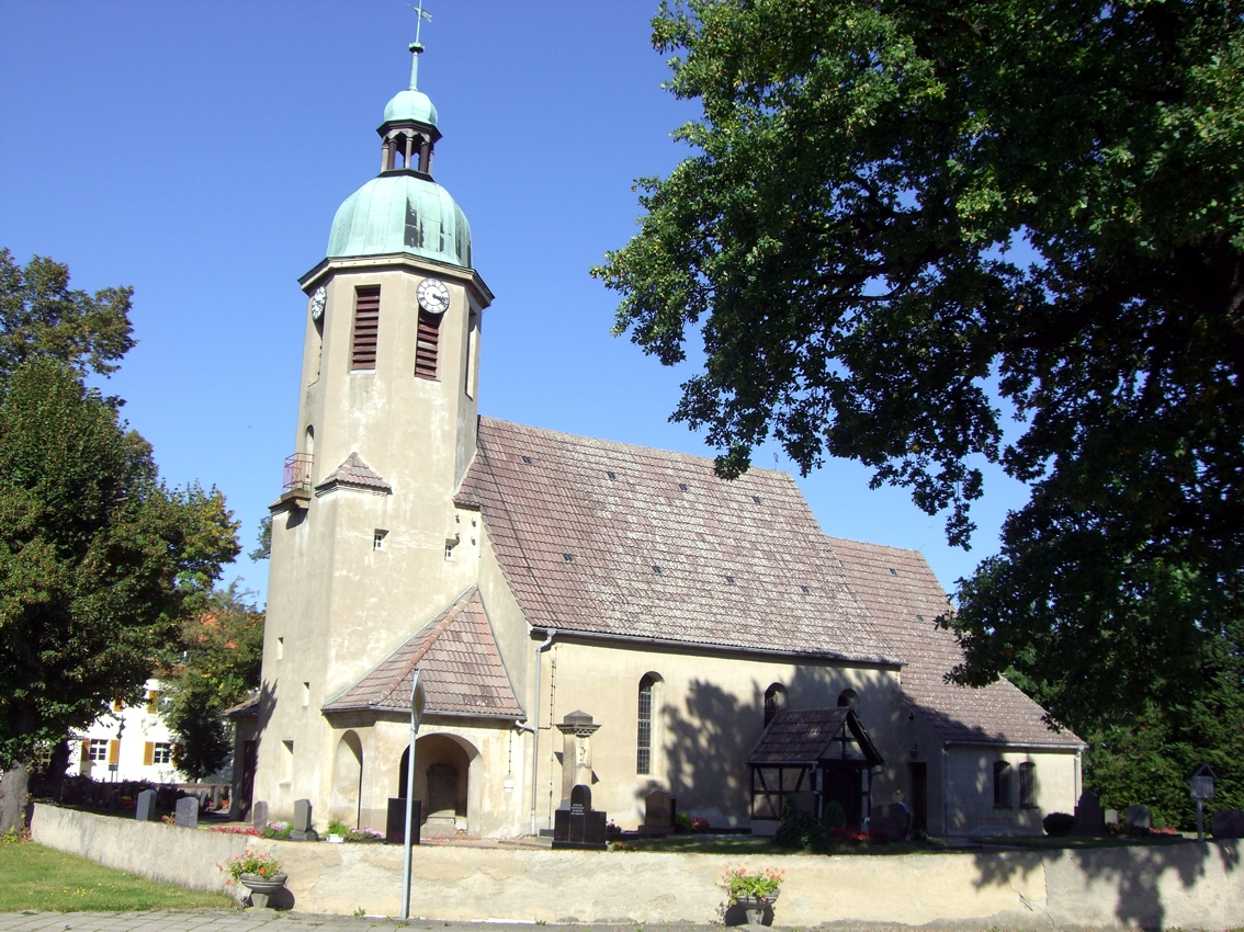 Stolzenhain an der Röder, Deutschland, Kirche.